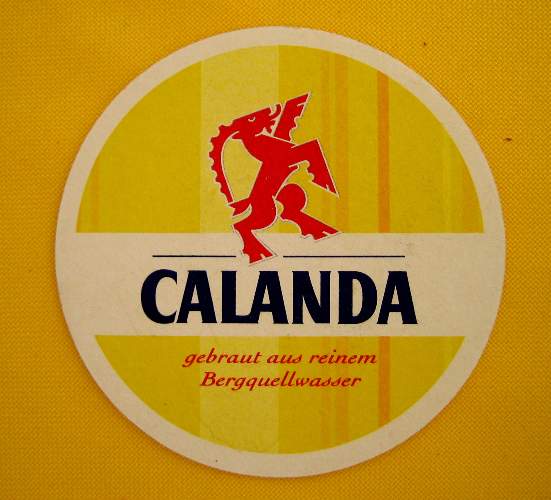 CalandaBierdeckel